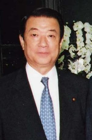 Tetsuma Esaki(江崎鉄磨).